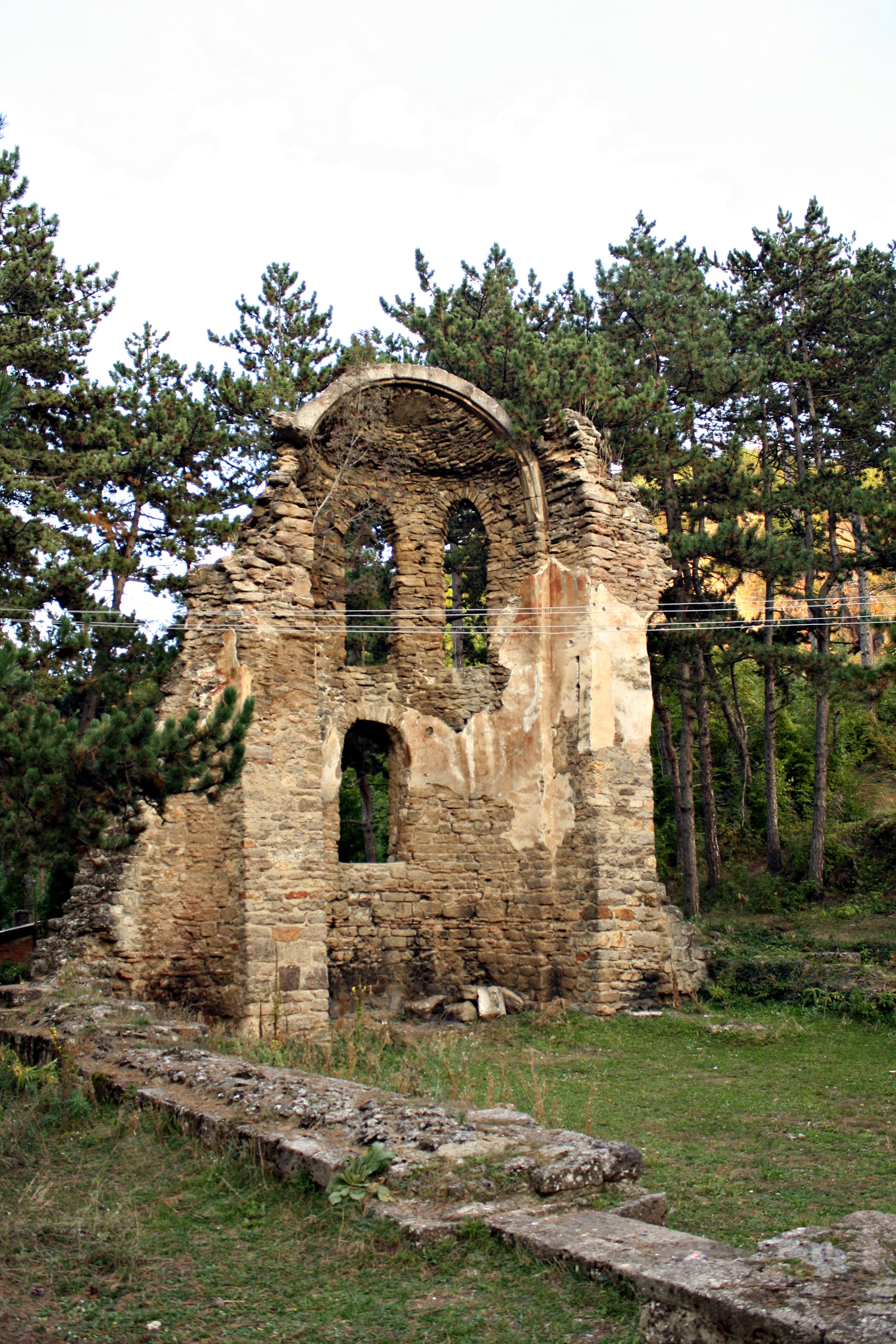 Gërmadhat e kishës Sakse, Stan Tërg, Mitrovicë, (Ambienture)